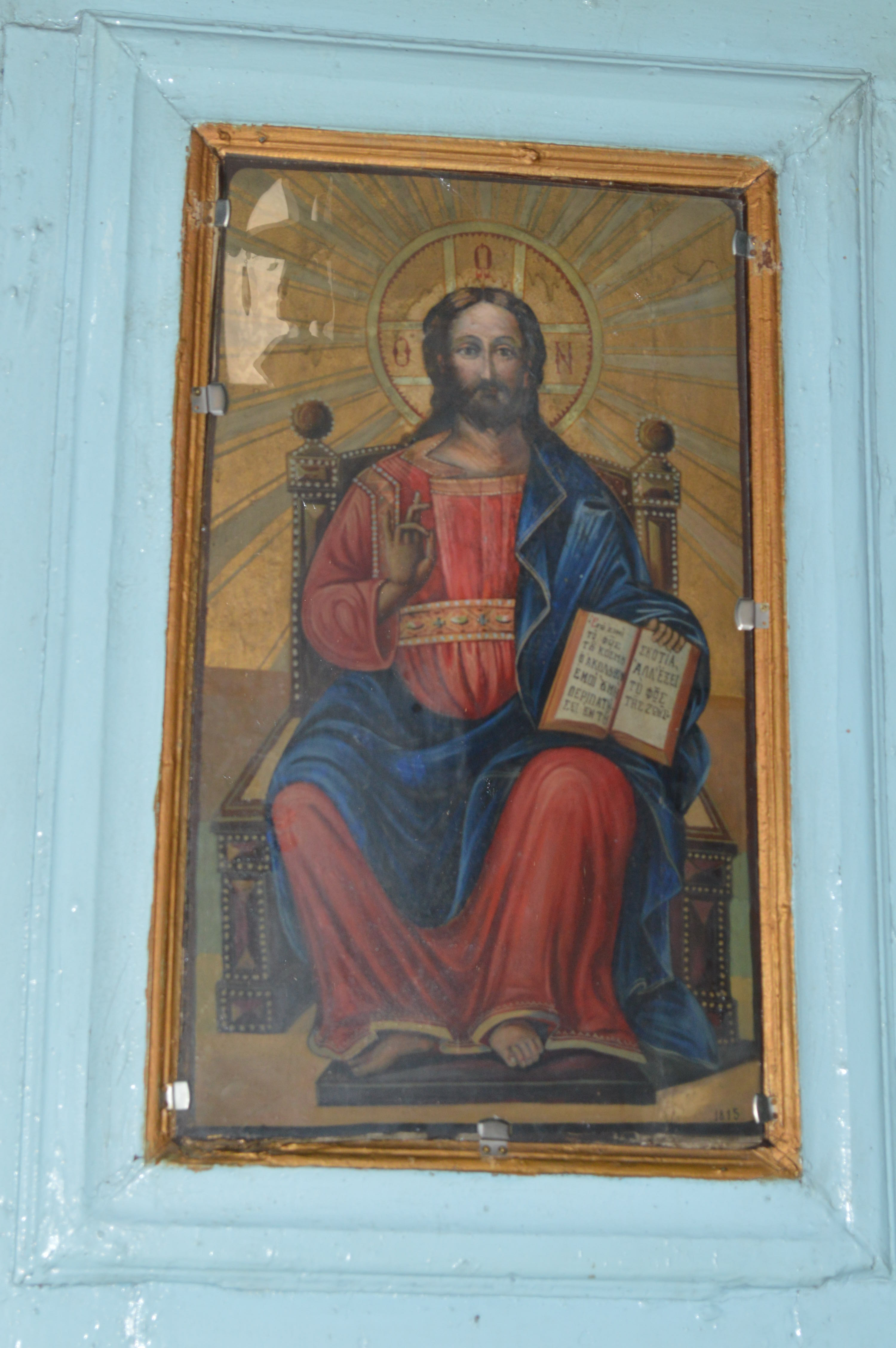 Εσωτερικό του Ναού (17)